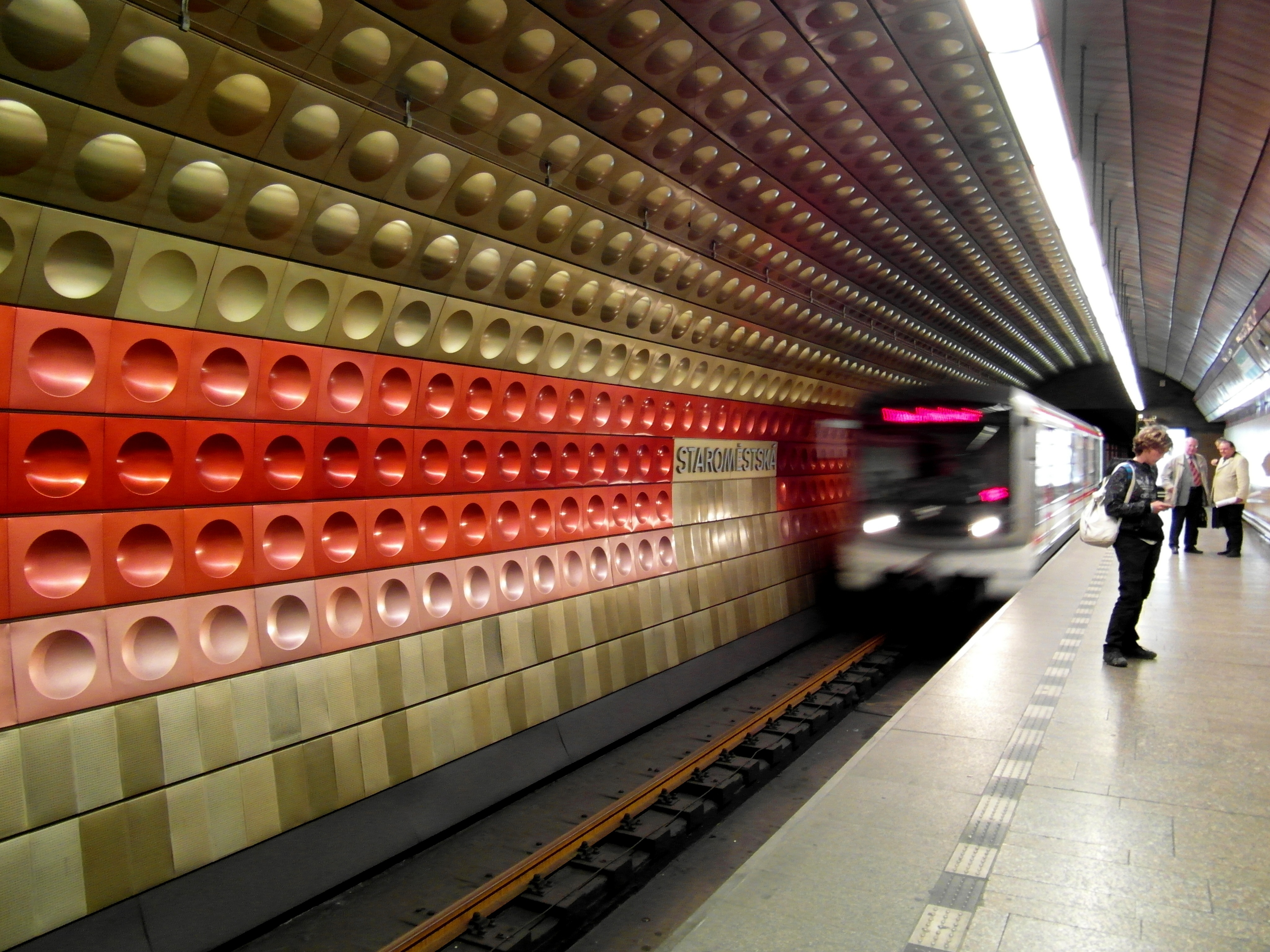 Praha - Metro - Staroměstská